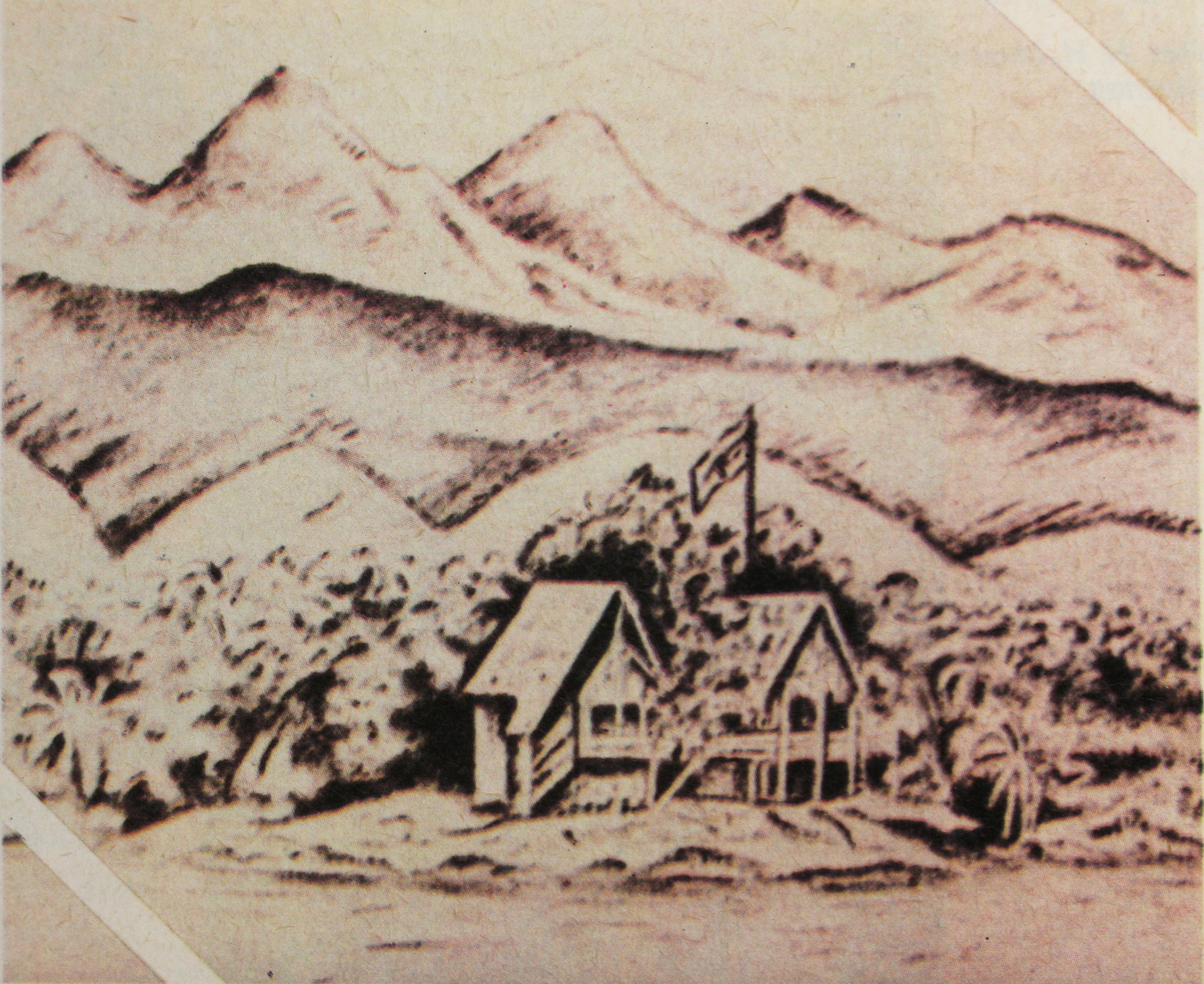 Новый дом Миклухо-Маклая (не тот, который был построен в сентябре 1871 года) на Новой Гвинее. Виден русский флаг, за домом горы. Рисунок 1876 или 77 года. Опубликовано в "Вокруг света", 1886.